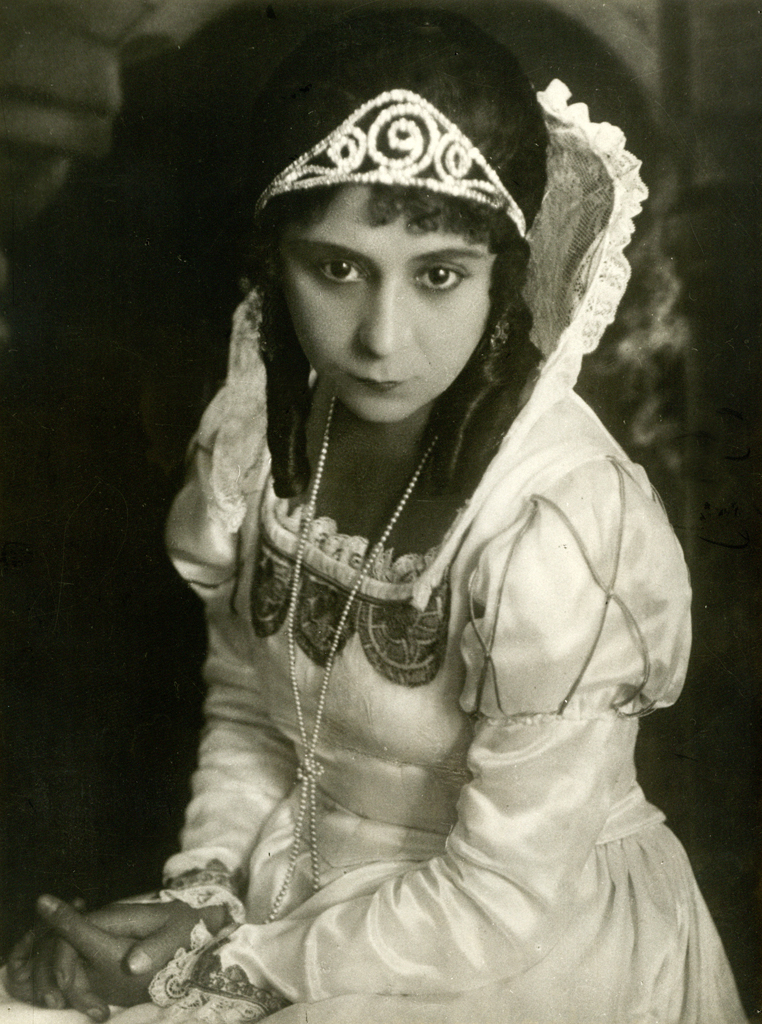 William Shakespeare, Romeo in Julija, Narodno gledališče v Ljubljani. Na fotografiji: Vida Juvan (Julija).